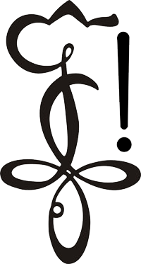 Cyrkiel Korporacji Akademickiej Jagiellonia.